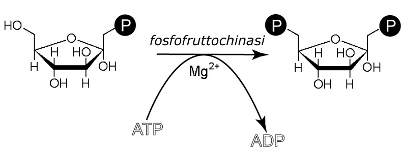 Sintesi del fruttosio 1,6 bifosfato